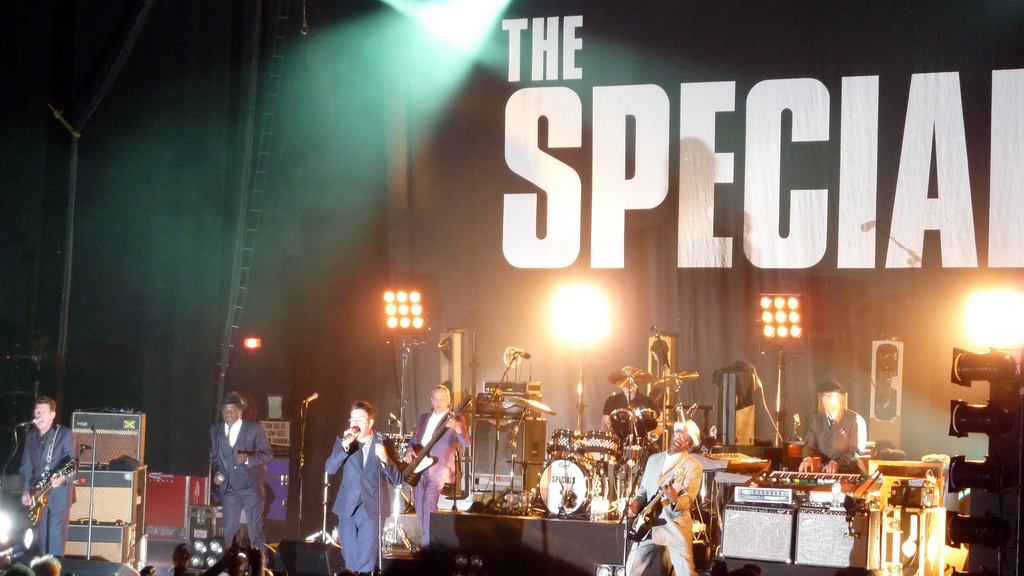 The special in concerto